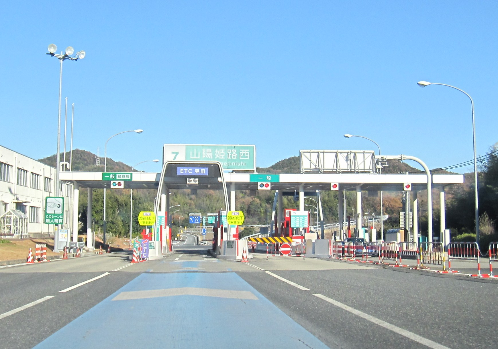 山陽姫路西インターチェンジ料金所